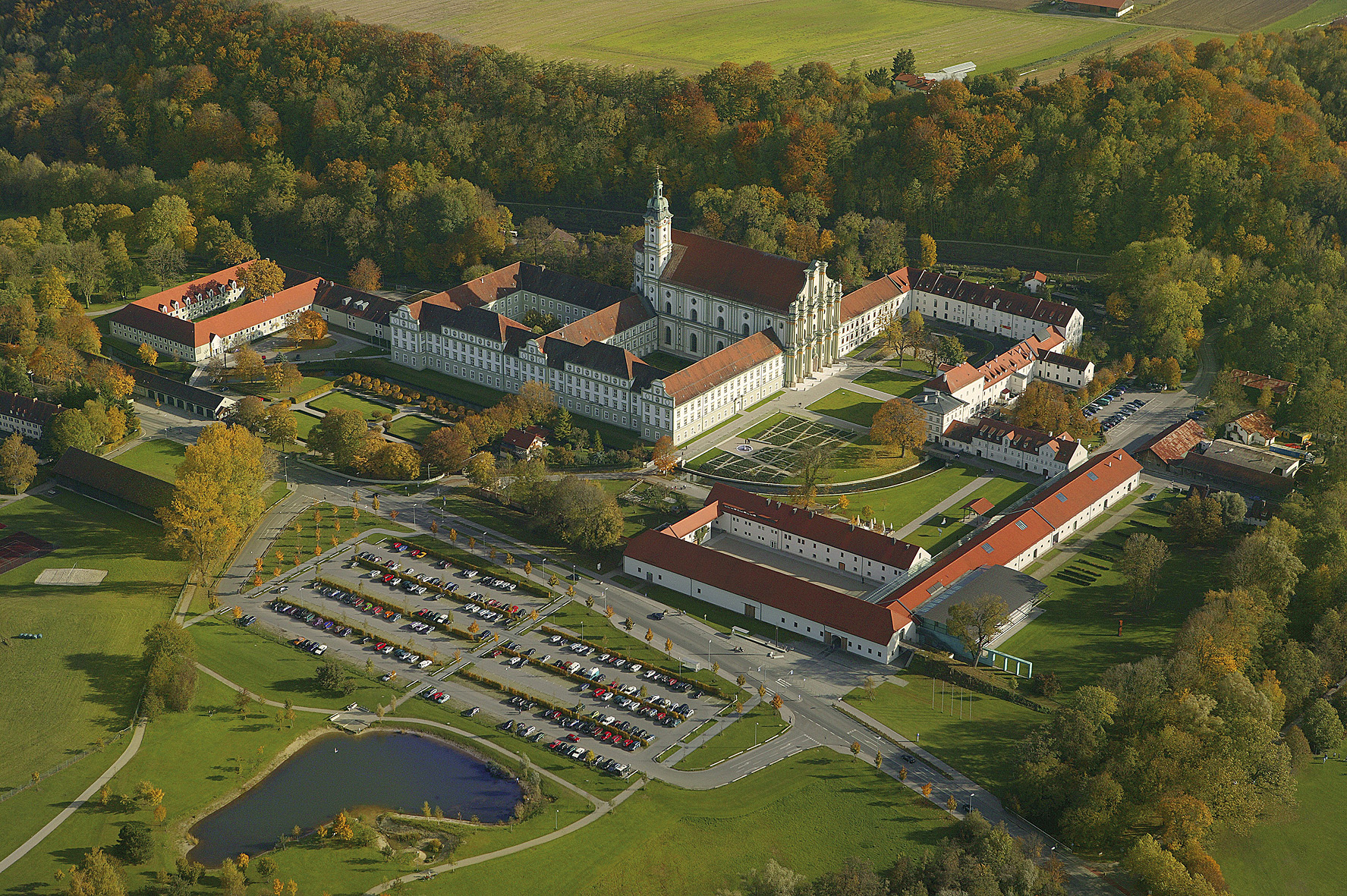 Luftbild des Areals Fürstenfeld in Fürstenfeldbruck, Bayern, Deutschland